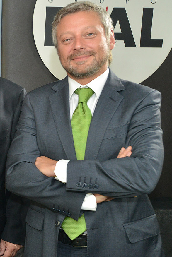 Juan Manuel Astorga en Radio Duna.